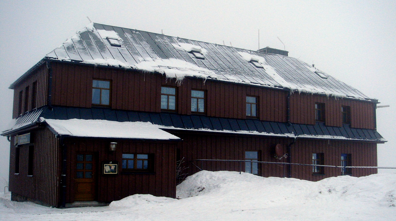 Hirtstein-Baude auf dem Hirtstein bei Satzung im Erzgebirge